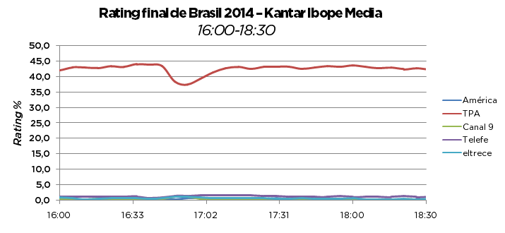 Rating Brasil 2014 Argentina. Superclásico de las Américas de 2014, Pekin, China (2:0)